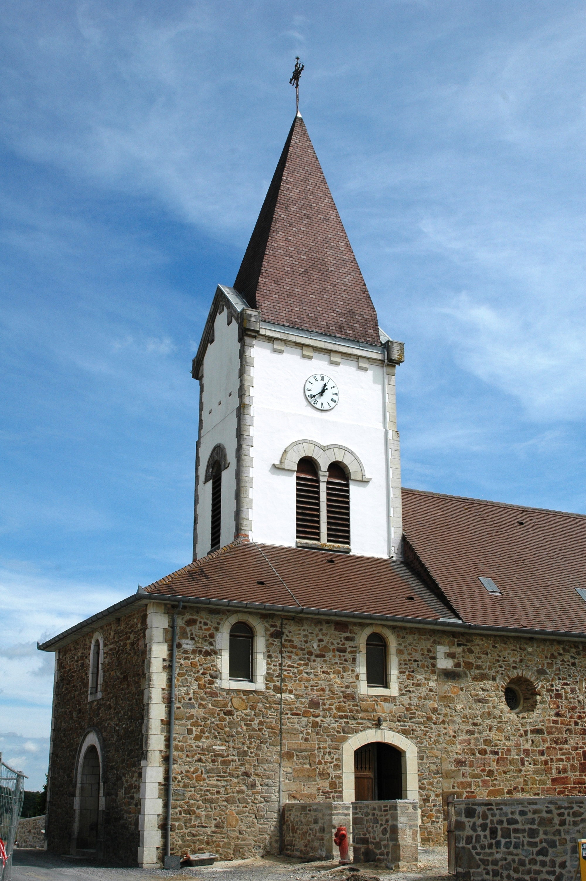 L'église Saint-Jean-Baptiste à Orègue